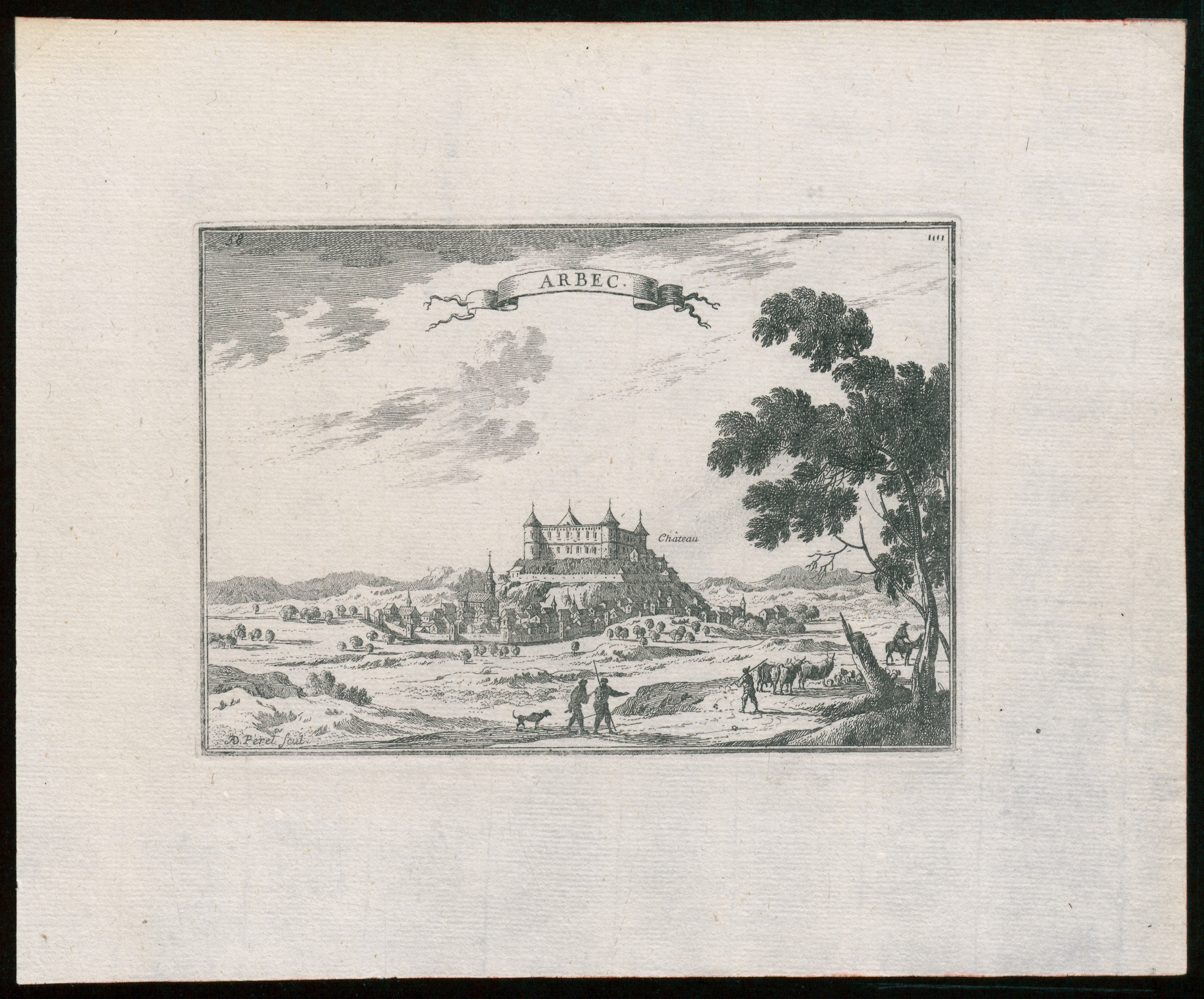 Gravat d'Arbeca. Vista panoràmica amb el castell i la ciutat emmurallada al fons. A la part del davant escena de pastors.